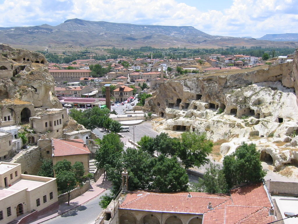 Ürgüp